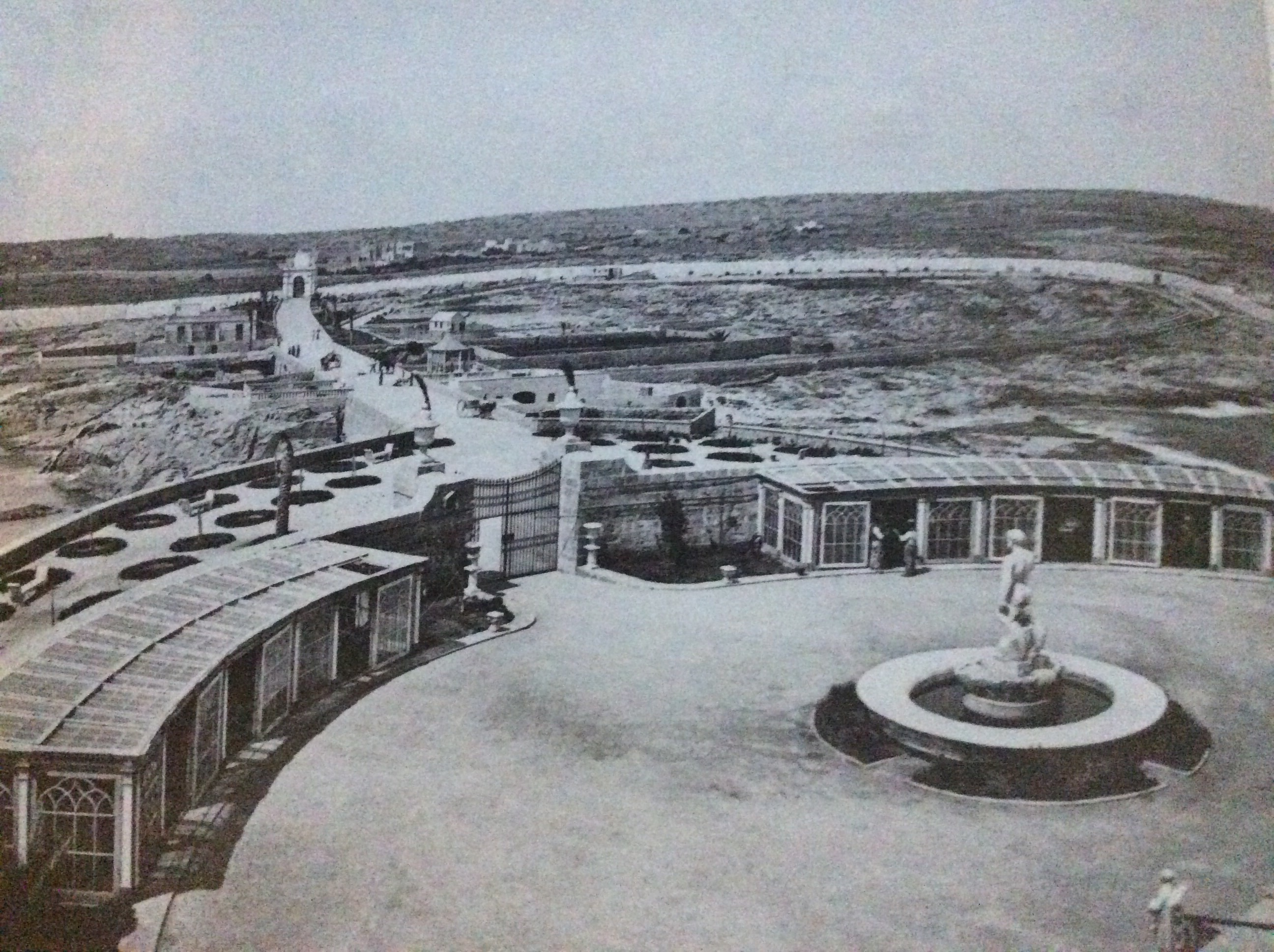 Widok z Dragonara Palace na teren, na ktorym teraz znajduje się Paceville (1870)